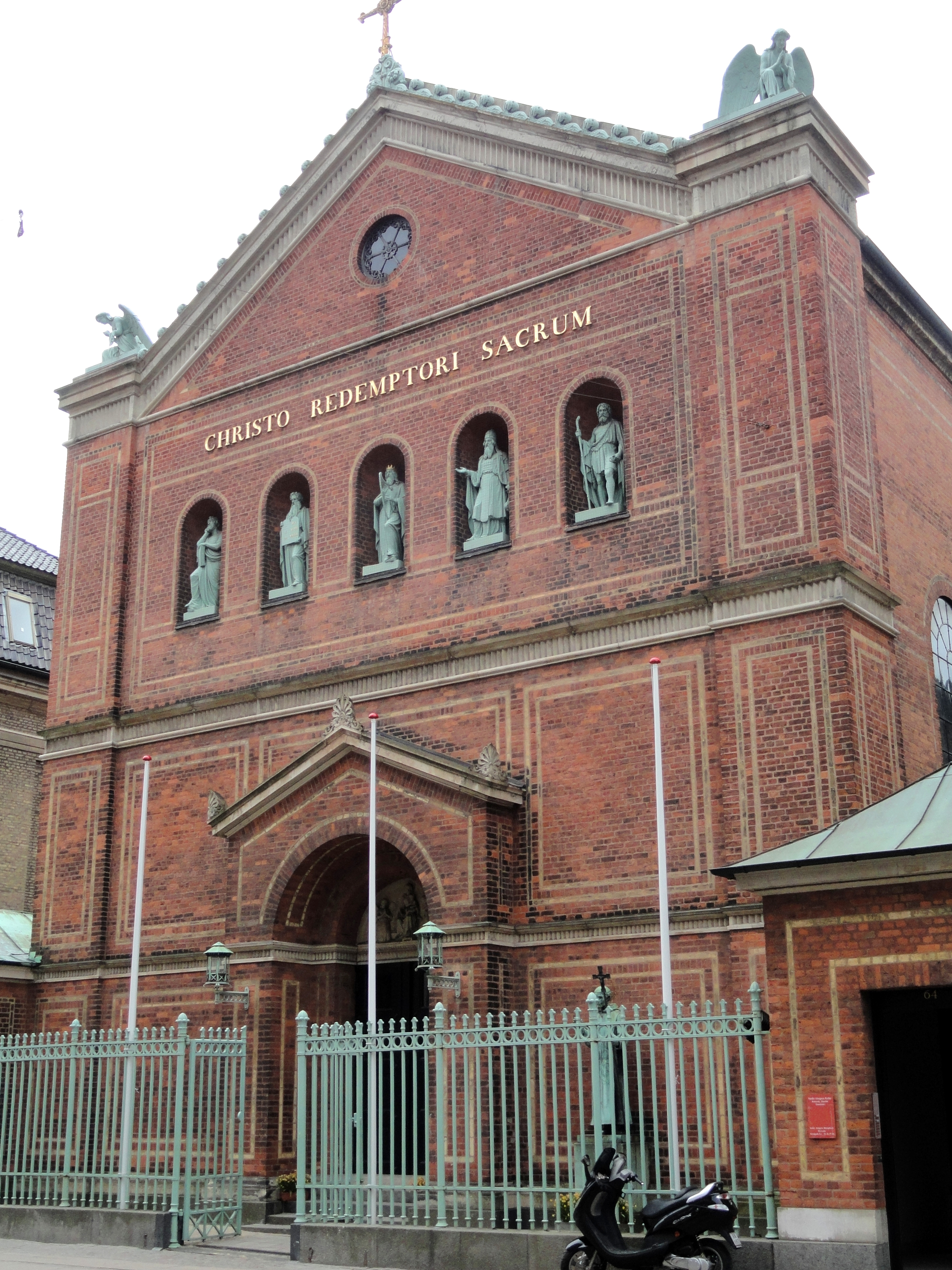 Sankt Ansgar Kirke, Copenhagen, Denmark.